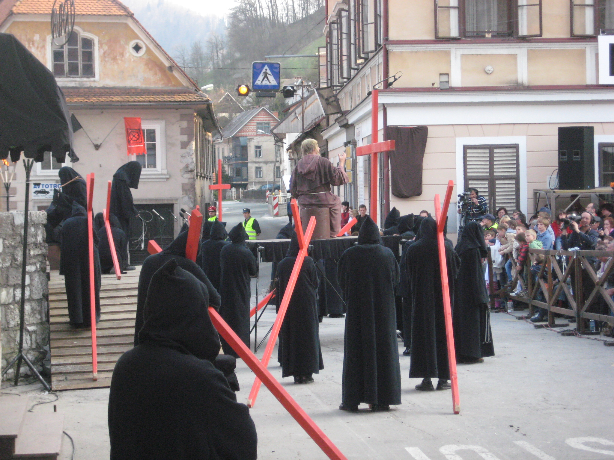 Škofjeloški pasijon (Processio Locopolitana), izvedba 2009 v Škofji Loki